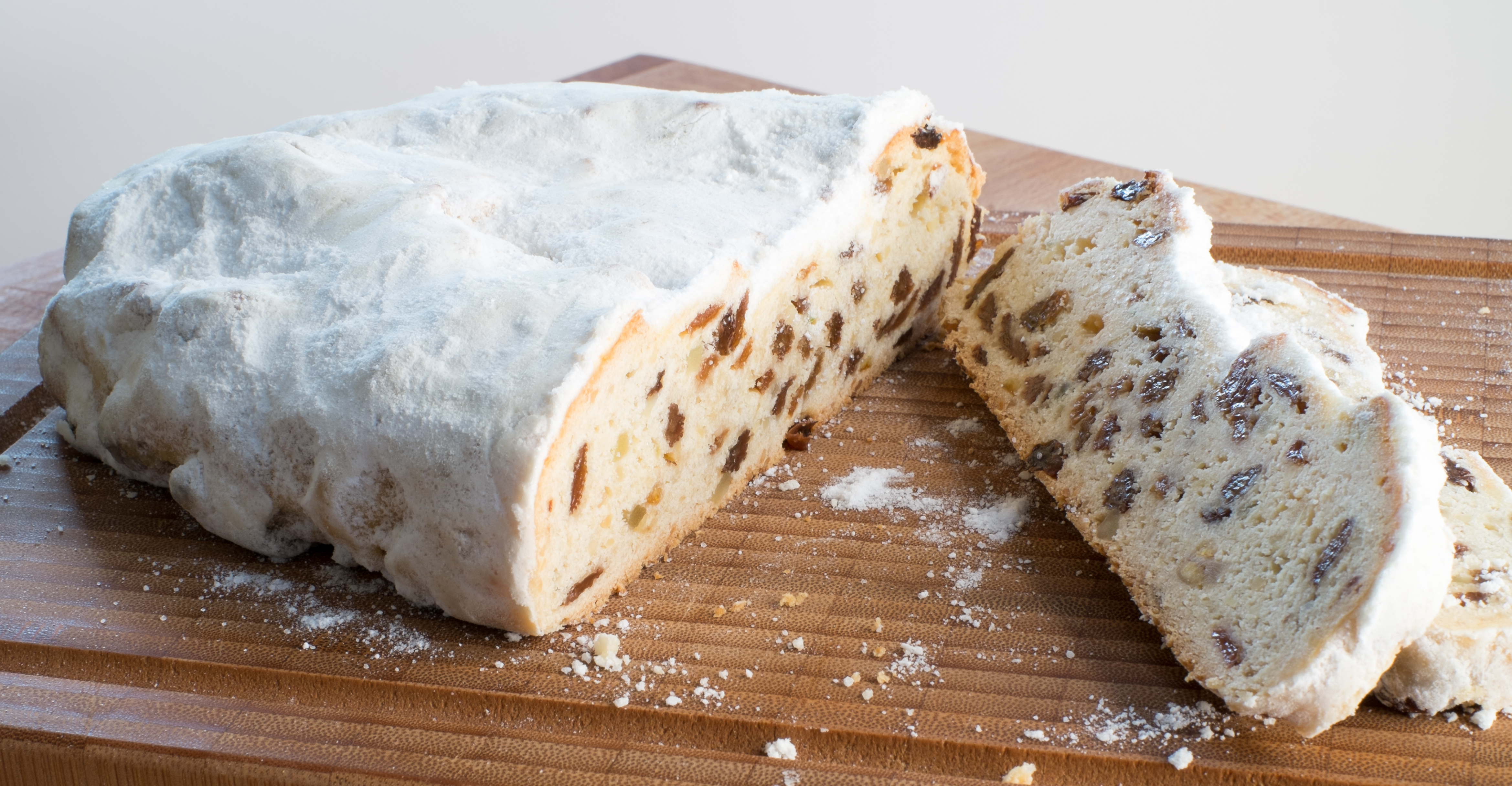 Dresdner Christstollen (Konditorei Maaß)